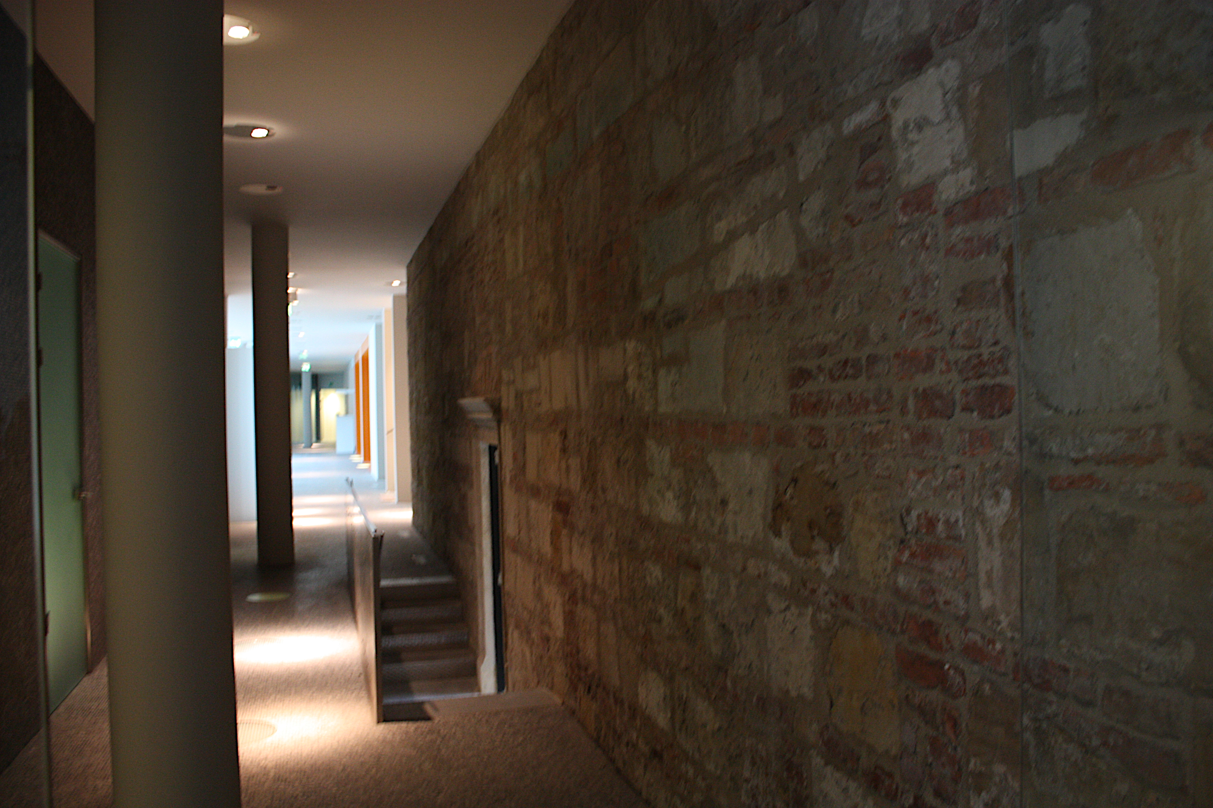 Rácz Fürdő